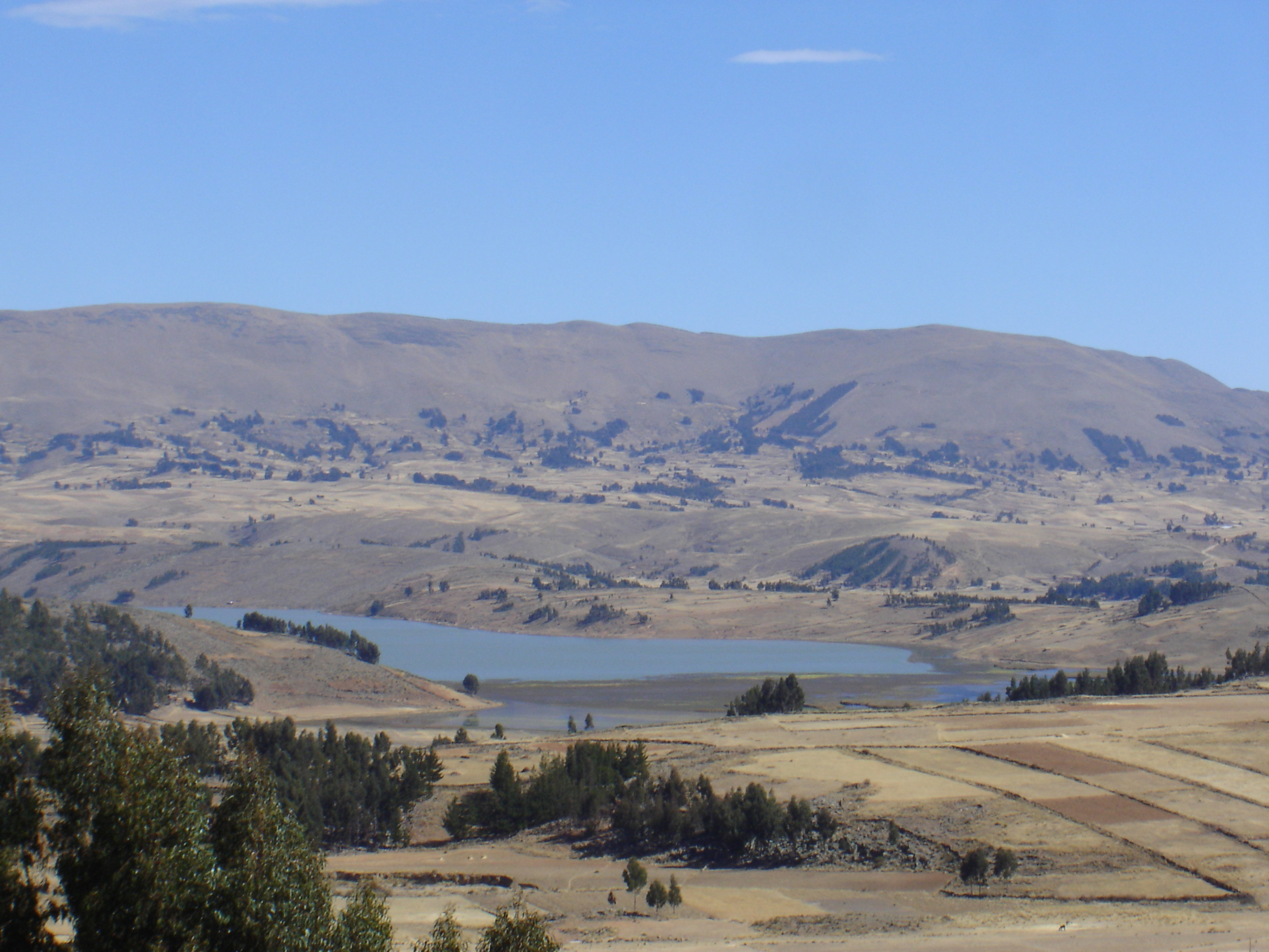 Laguna Asiruqucha, vista de una parte, se encuentra al sud oeste de la Población de Vacas. Fotografía hecha desde el Calvario de Santa Bárbara.